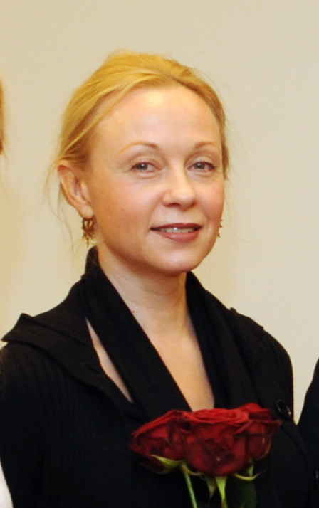 Piret Kalda välisministeeriumi kultuuripreemia üleandmisel